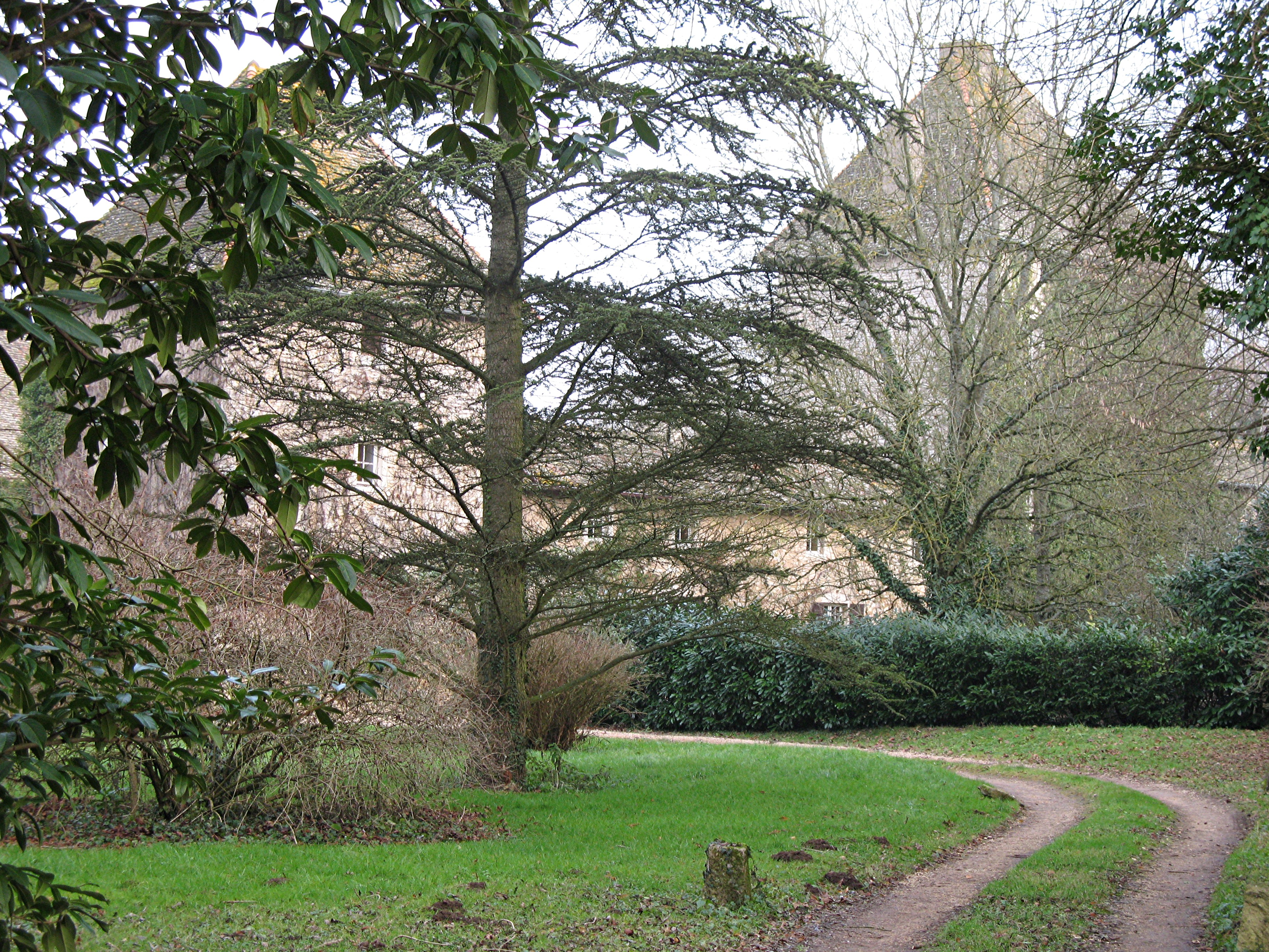 château de Buffières - Montbellet (Saône-et-Loire)